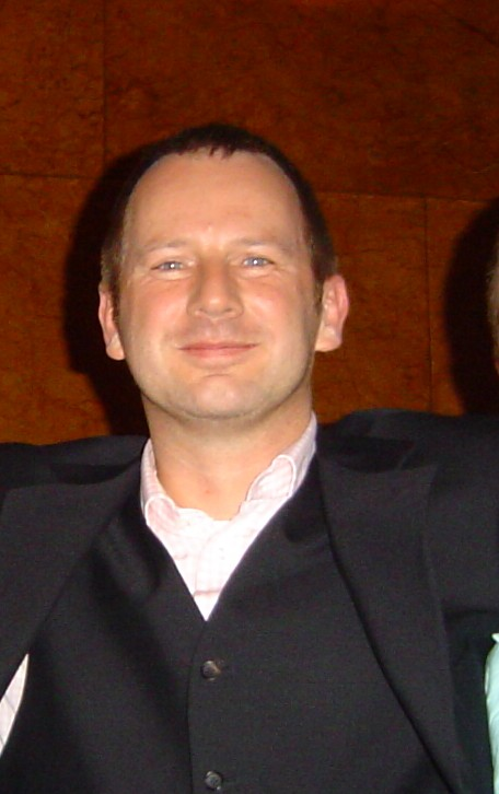 Johannes Kahrs 2006(Bildausschnitt) beim Bürgerschaftsempfang der GAL